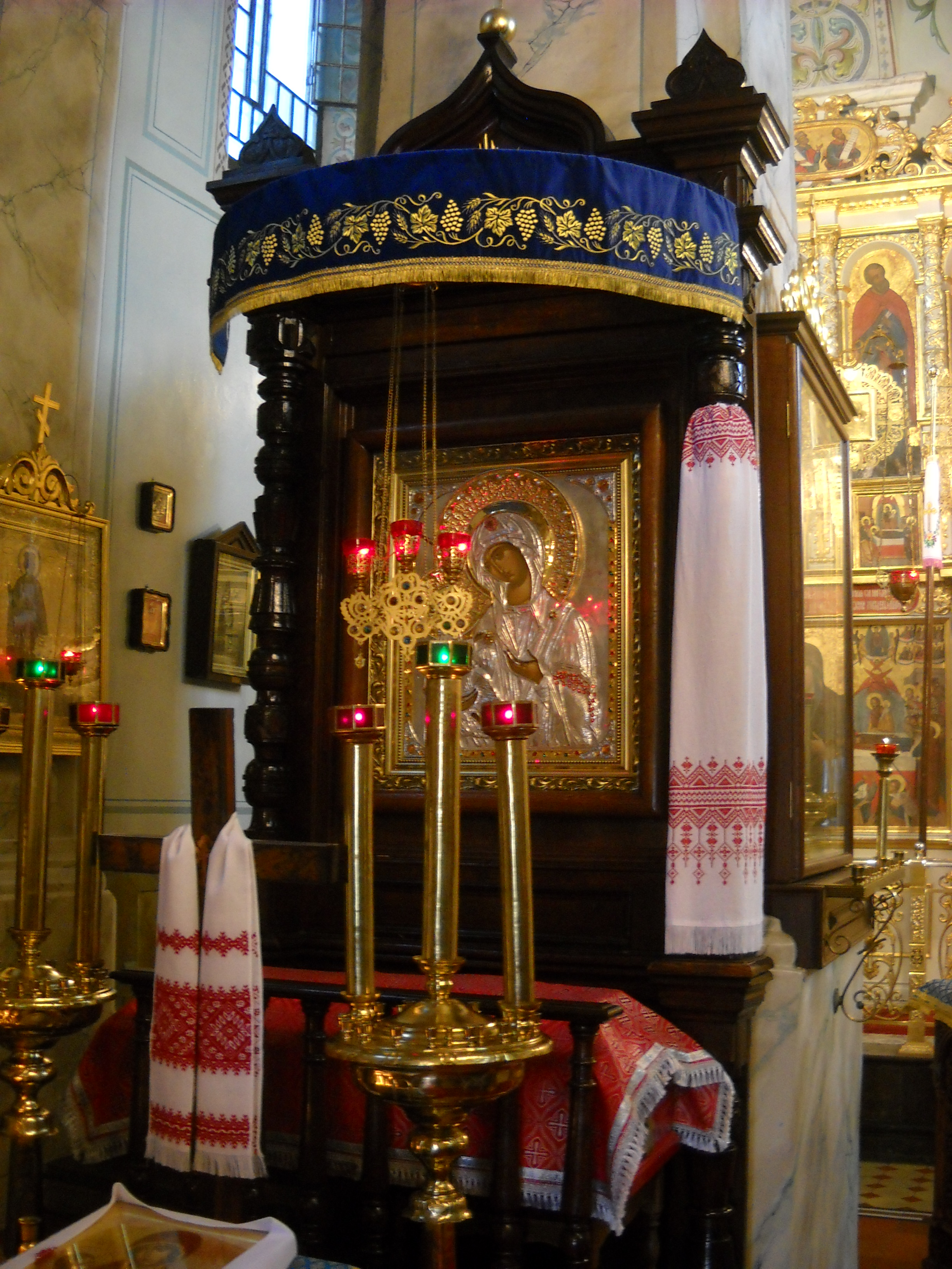 Jerozolimska Ikona Matki Bożej w soborze w Lublinie